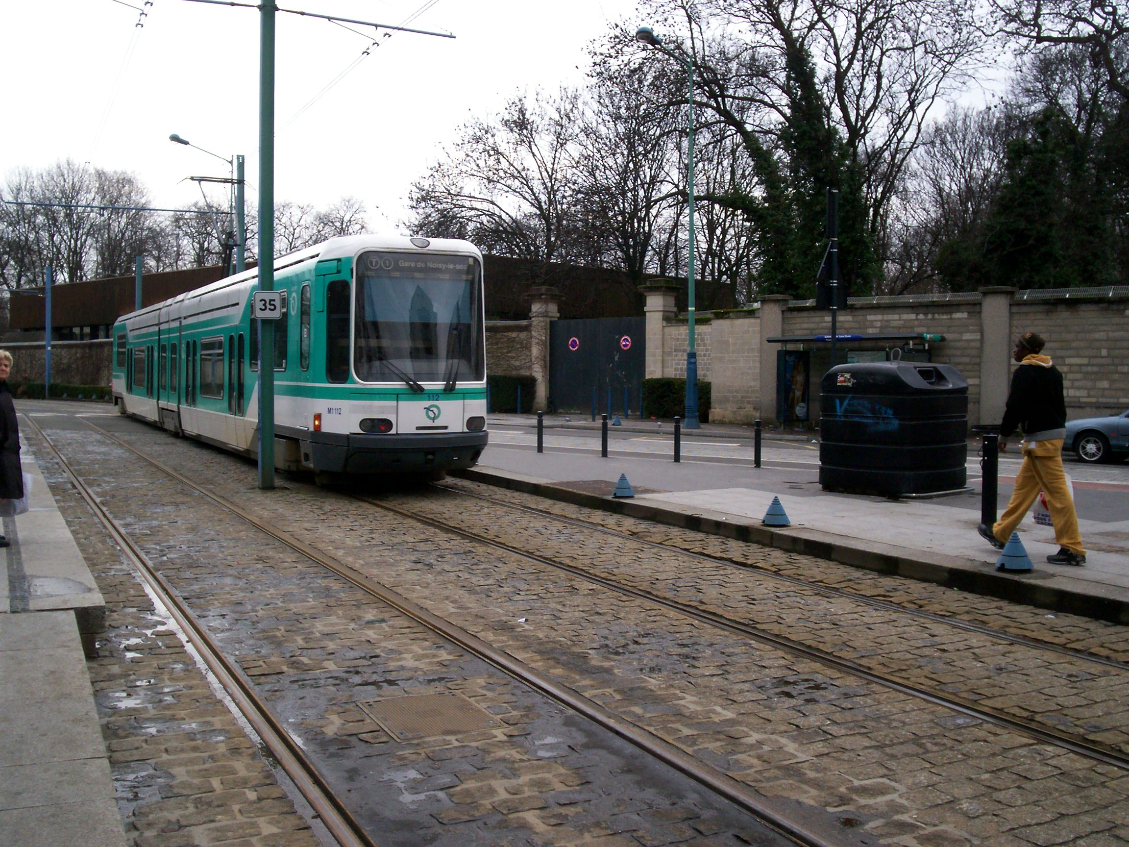 T1 à Cimetière de Saint-Denis